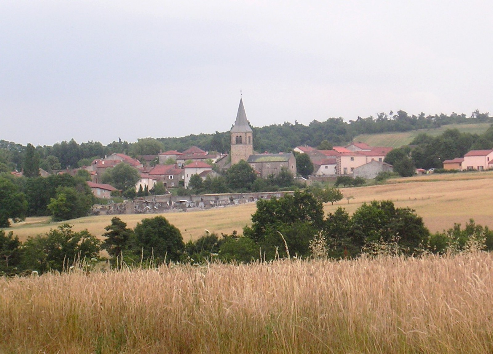 Le village de Saint-Bauzire (Haute-Loire) France